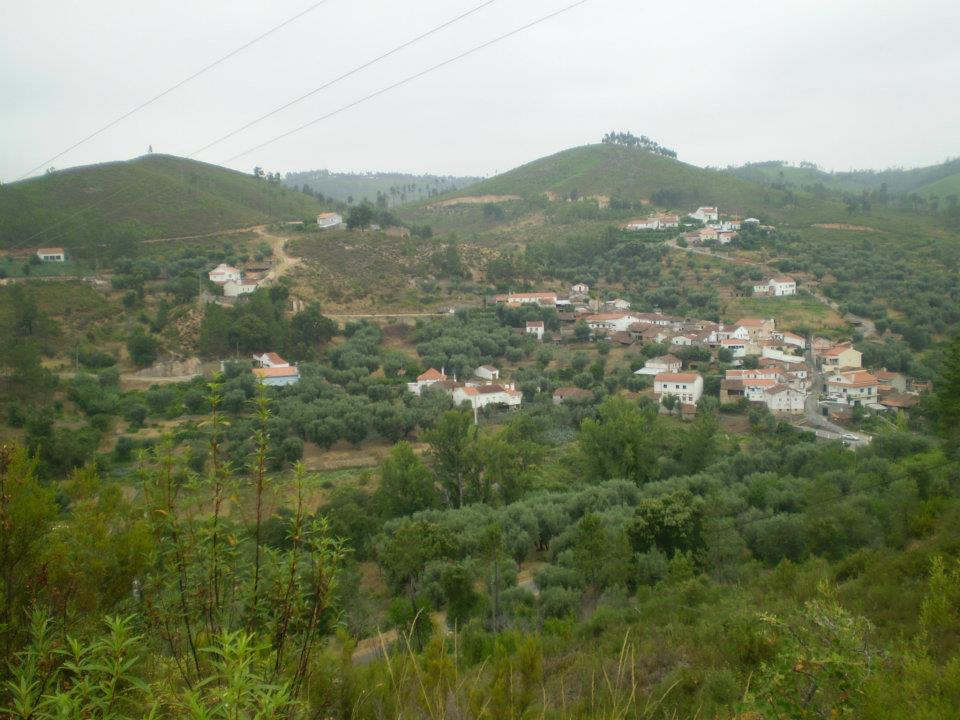 Aldeia